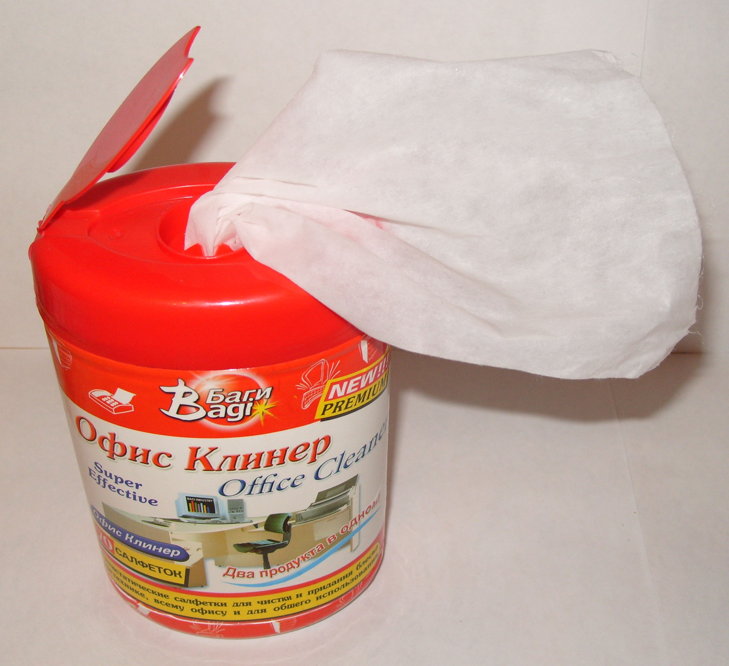 Рулон антистатических салфеток в упаковке